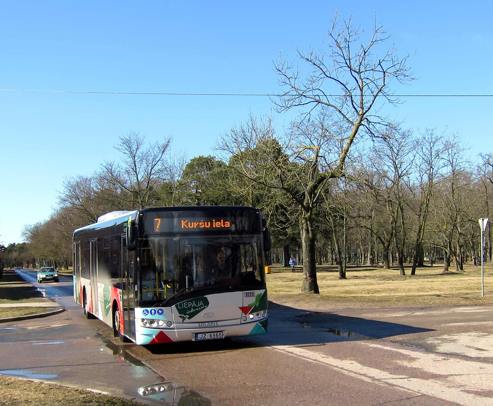 7. autobuss Karostas rajonā